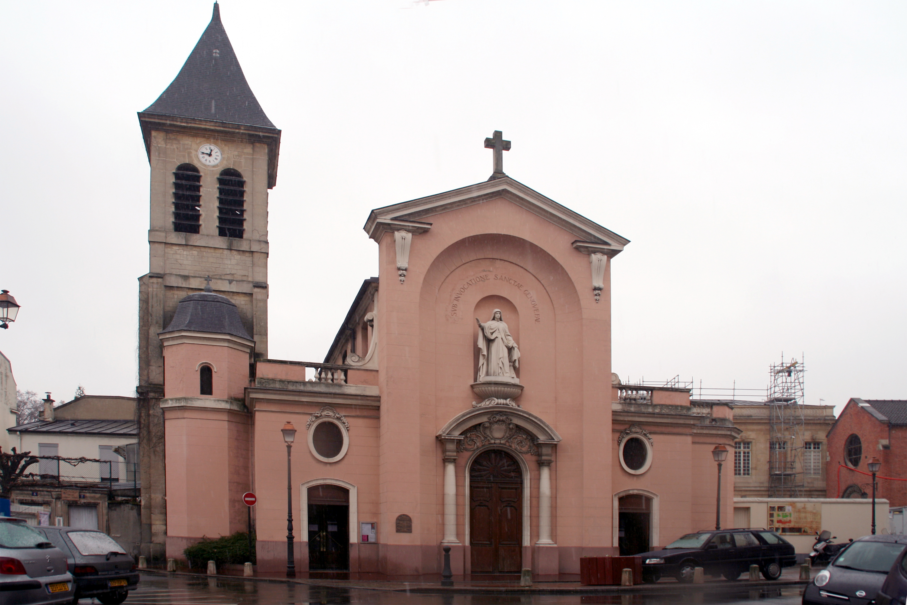 façade de l'église Sainte-Geneviève d'Asnière-sur-Seine